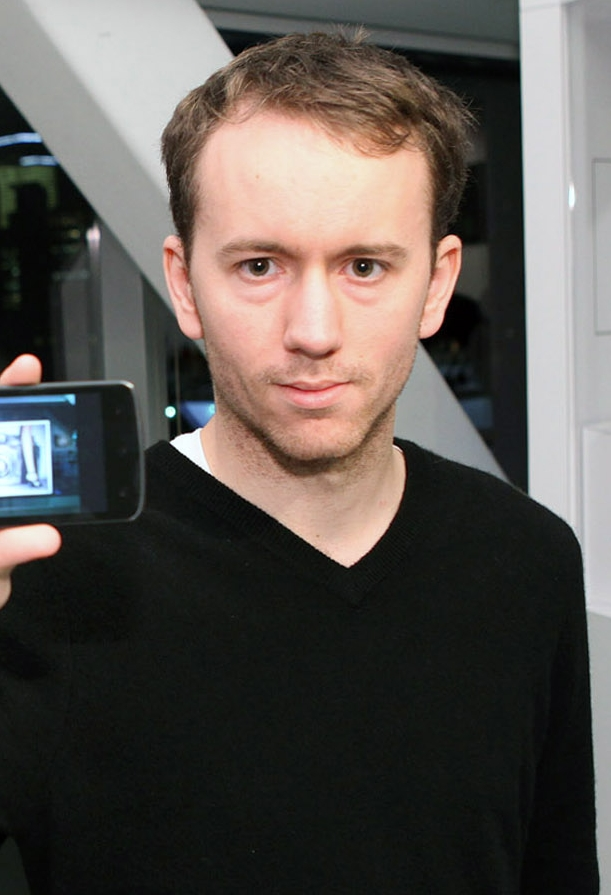 세계적 사진작가 타일러 쉴드가 12월 1일 뉴욕 뉴뮤지엄에서 열린 '니트로HD' 행사에서 포즈를 취하고 있는 사진(Tyler Shields at the LG Nitro HD event, New Museum, New York) ※ LG전자 뉴스룸 에서 관련 보도자료를 확인실 수 있습니다.